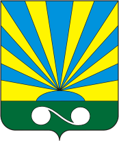 Герб г. Окуловка Новгородской обл.